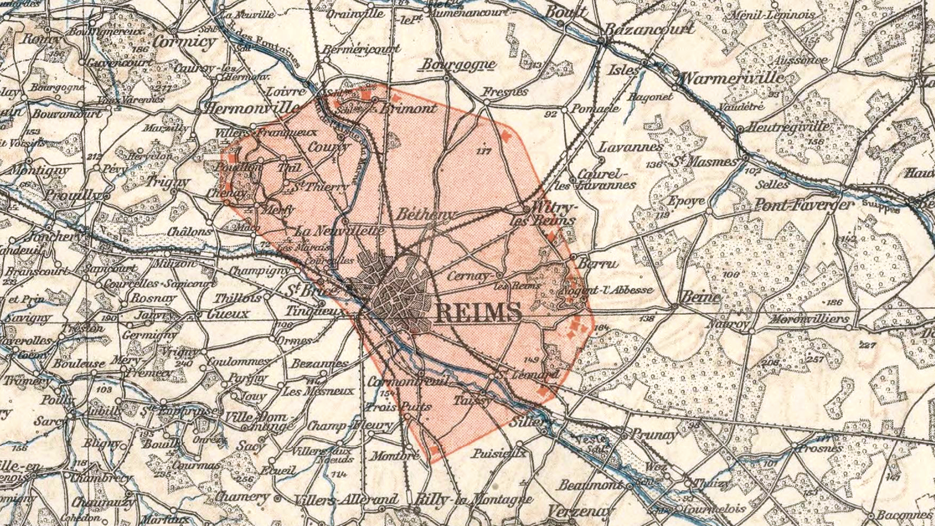 EXTRAIT - Région de Reims vue sur la carte allemande du nord-est de la France et de la frontière franco-allemande, 1907.